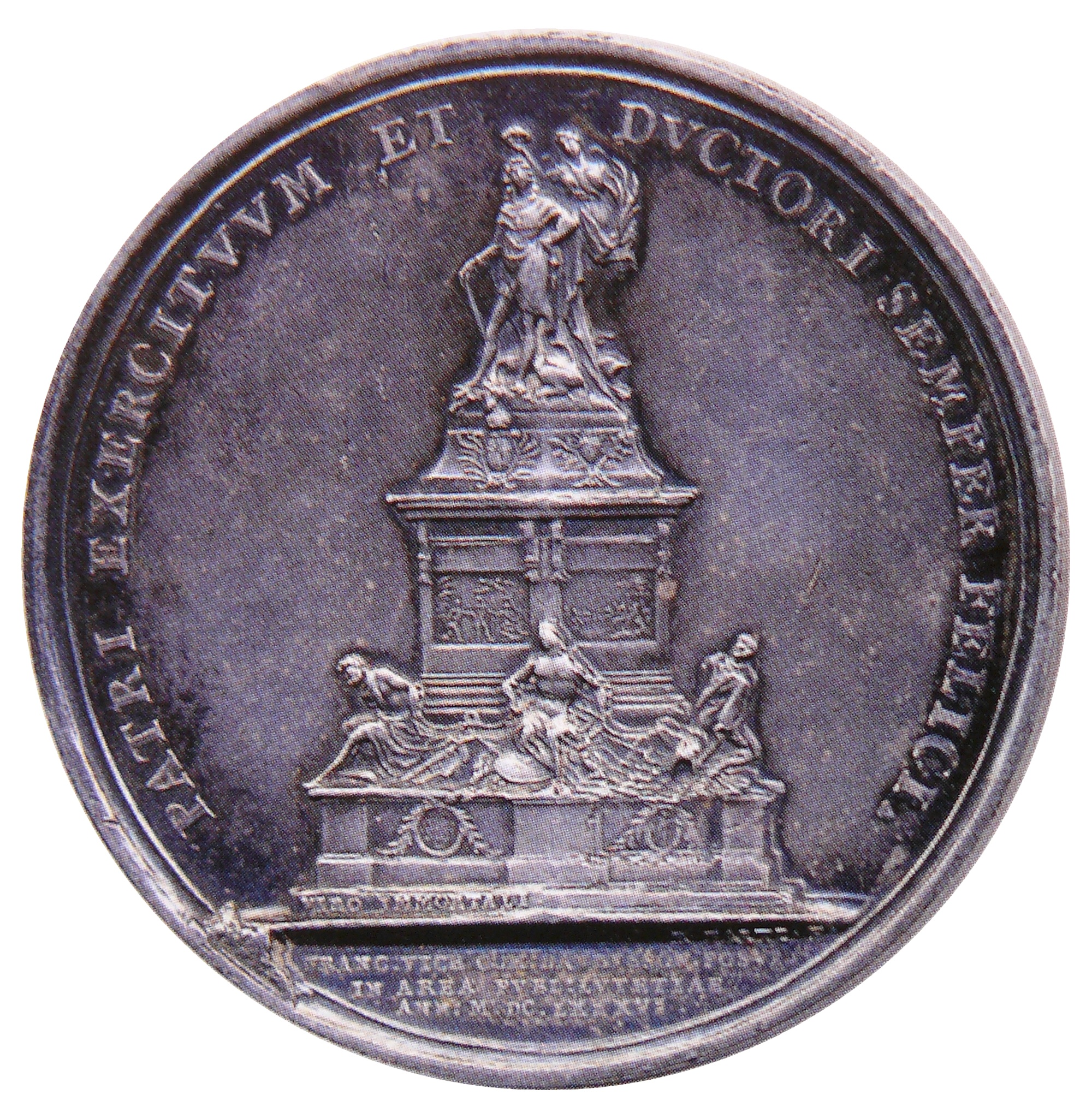 Médaille par Joseph Roëttiers et J. Dollin en argent diamètre 62 mm. Avers : portrait de Louis XIV, Revers : 1686, inauguration de la statue de Louis XIV de Martin Desjardins (aujourd'hui détruite) sur la place des Victoires, Paris.